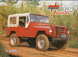 Foto utilizada no anúncio do jipe